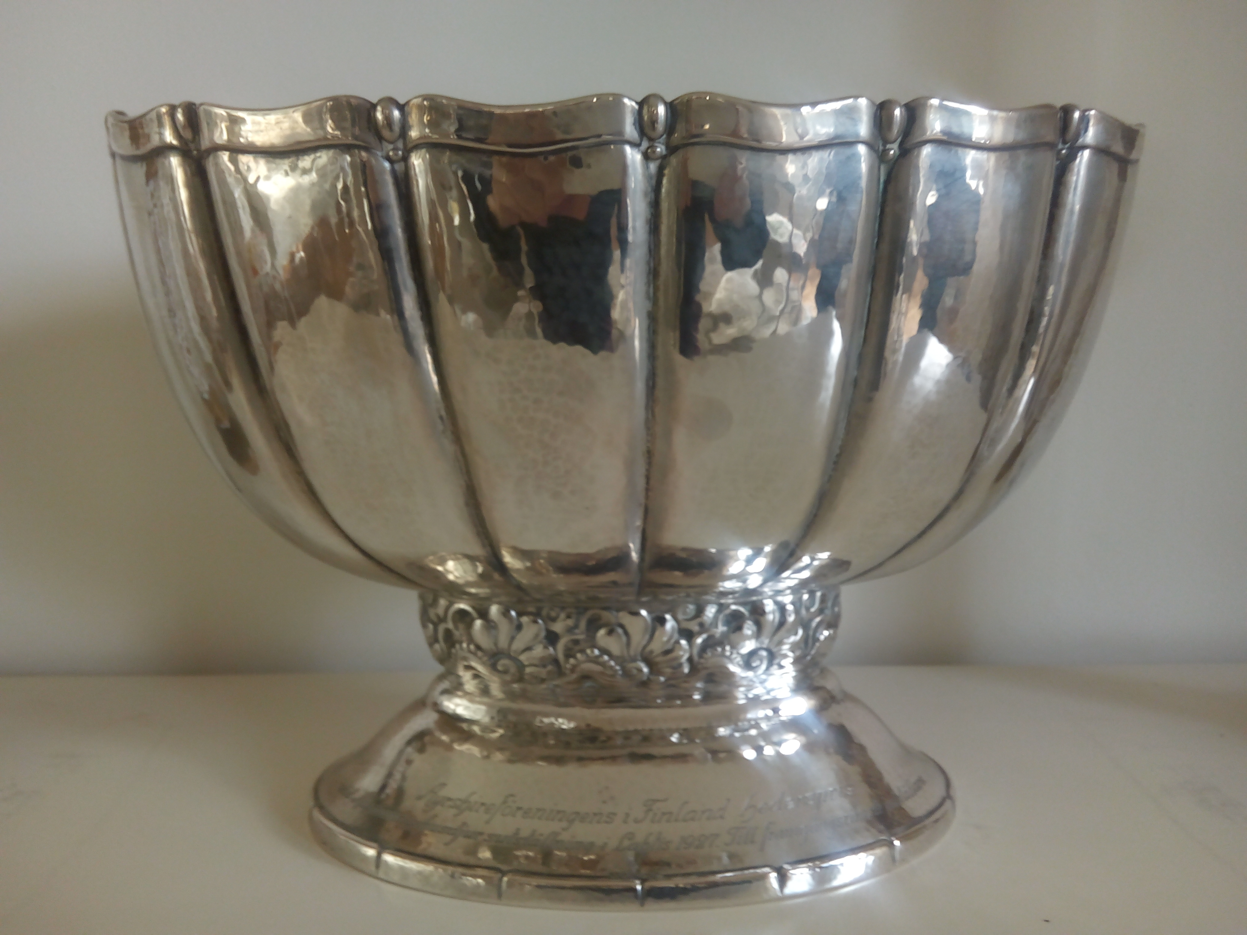 Suomen Ayrshire yhdistyksen palkinto